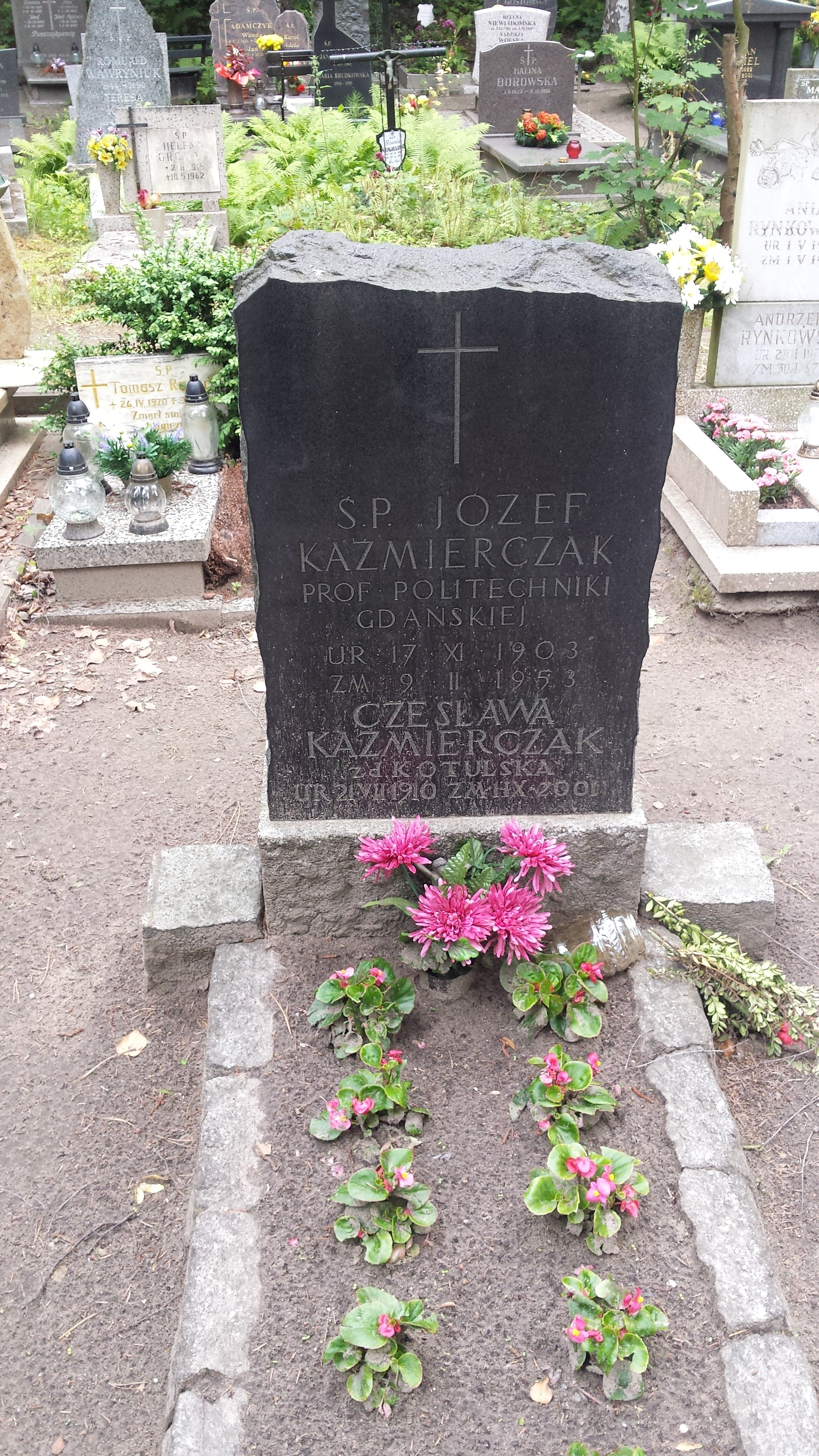 Grób inżyniera okrętowca Józefa Kaźmierczaka (1903-1953) na cmentarzu Srebrzysko.